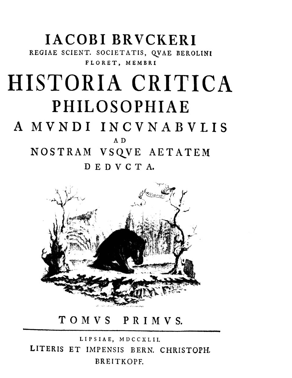 1: A mundi incunabulis ad nostram usque aetatem deducta. - Lipsiae : literis et impensis Bern. Christoph. Breitkopf, 1742. - [16], 1357, [35] p., [1] c. di tav. ; 4º .